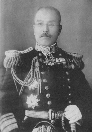 Japanese admiral Misu Sotaro (1855-1921)